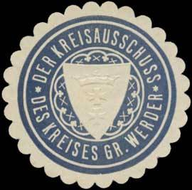 Sealing stamp Title: Der Kreisausschuss des Kreises Großes Werder Description: blau, weiß, geprägt Place: Tiegenhof, Großes Werder size: 4 cm